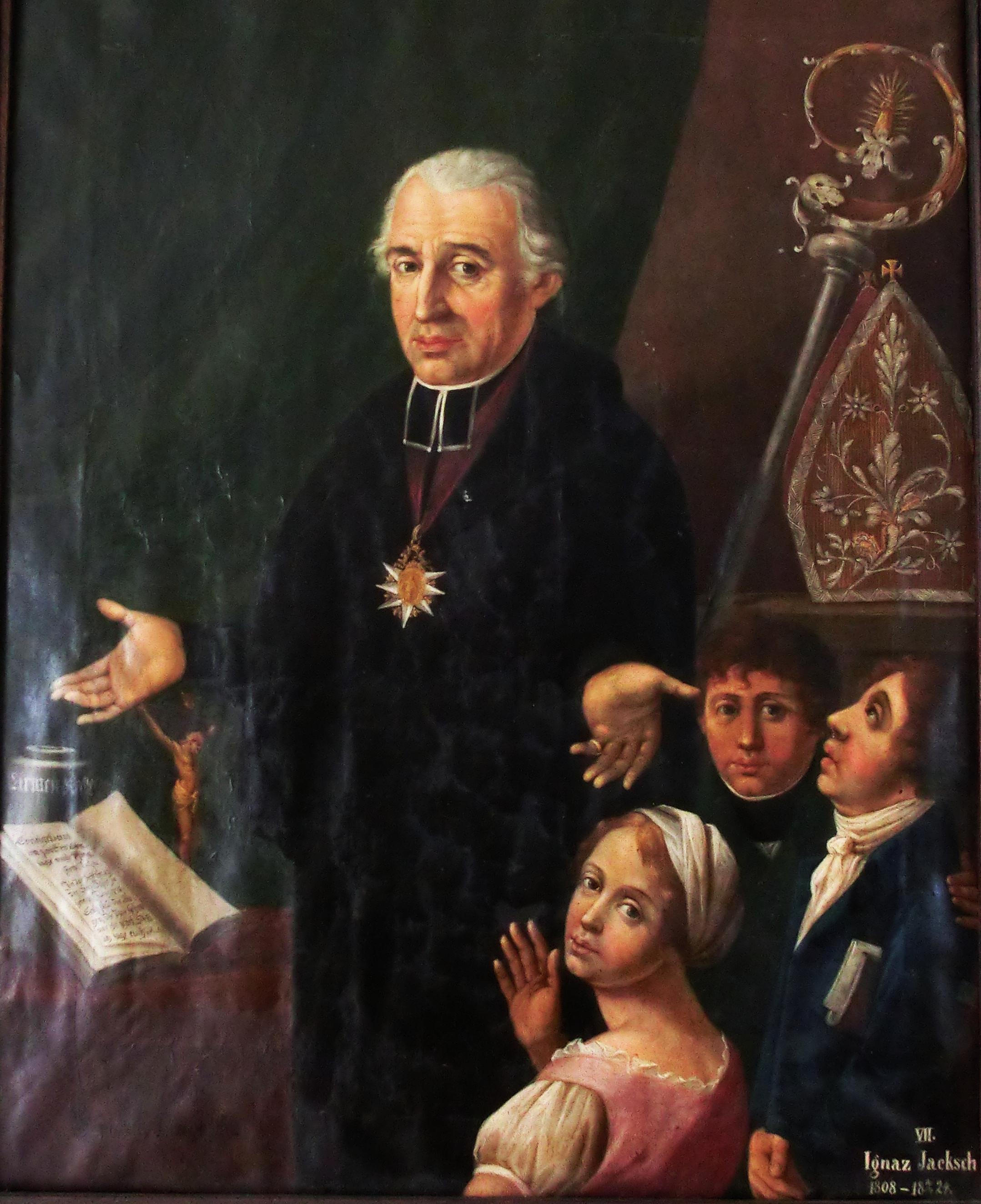 1824 Ignác Jaksch, 7. infulovaný arciděkan Horní Police.